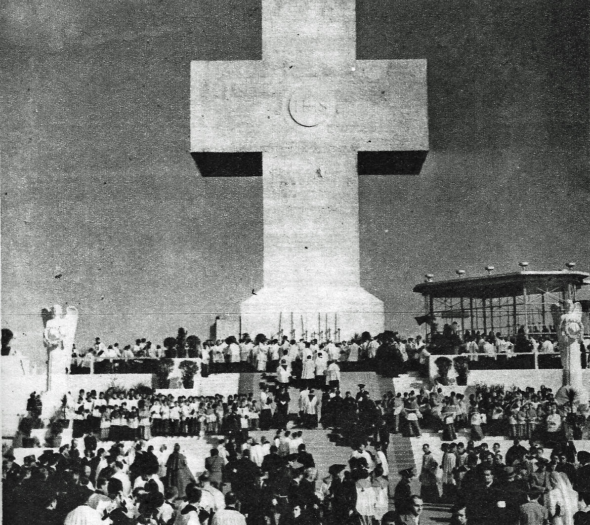 Congreso Eucarístico en Buenos Aires, Argentina. Se observa la gran cruz erigida sobre el Monumento de los Españoles.